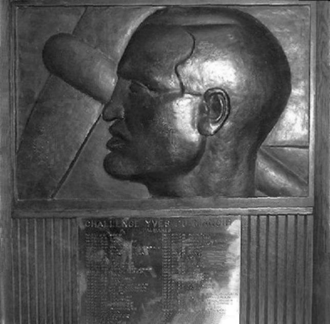 Trophée du Challenge Yves du Manoir.